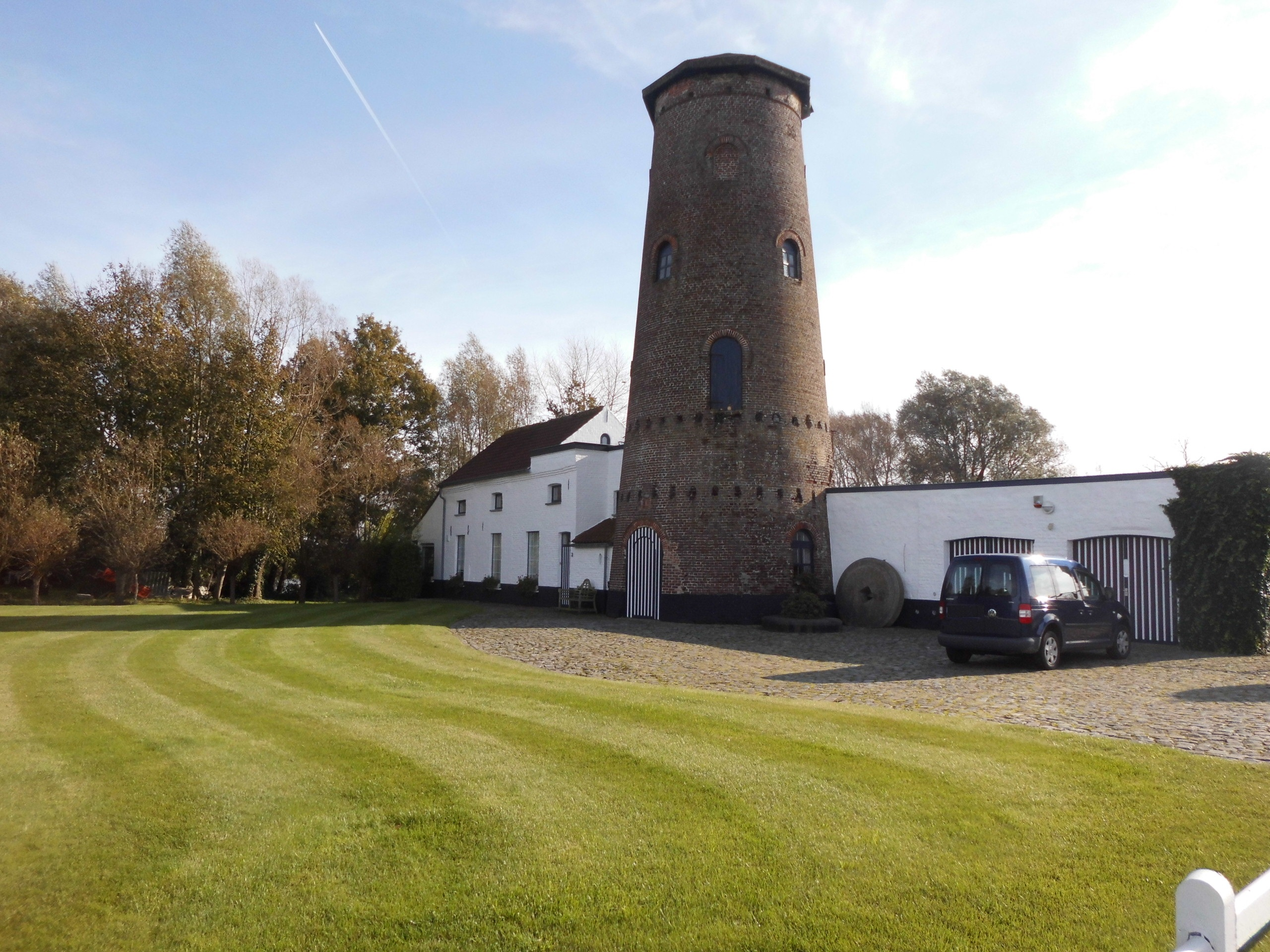 Boerenmolen - Oude Bruggeweg - Snellegem - Jabbeke - West-Vlaanderen - België